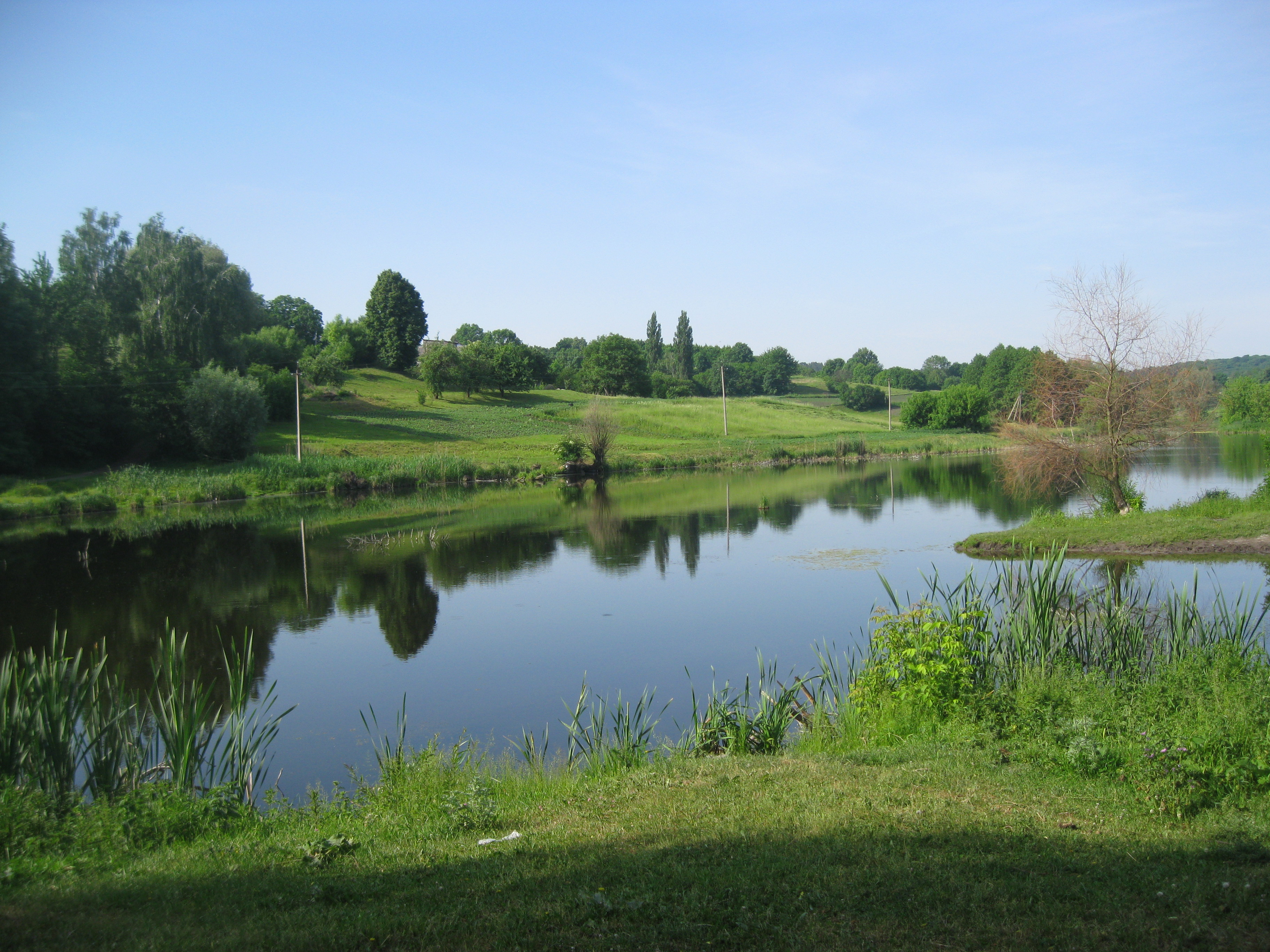 Плужне. Колгоспний став, влітку 2011 року